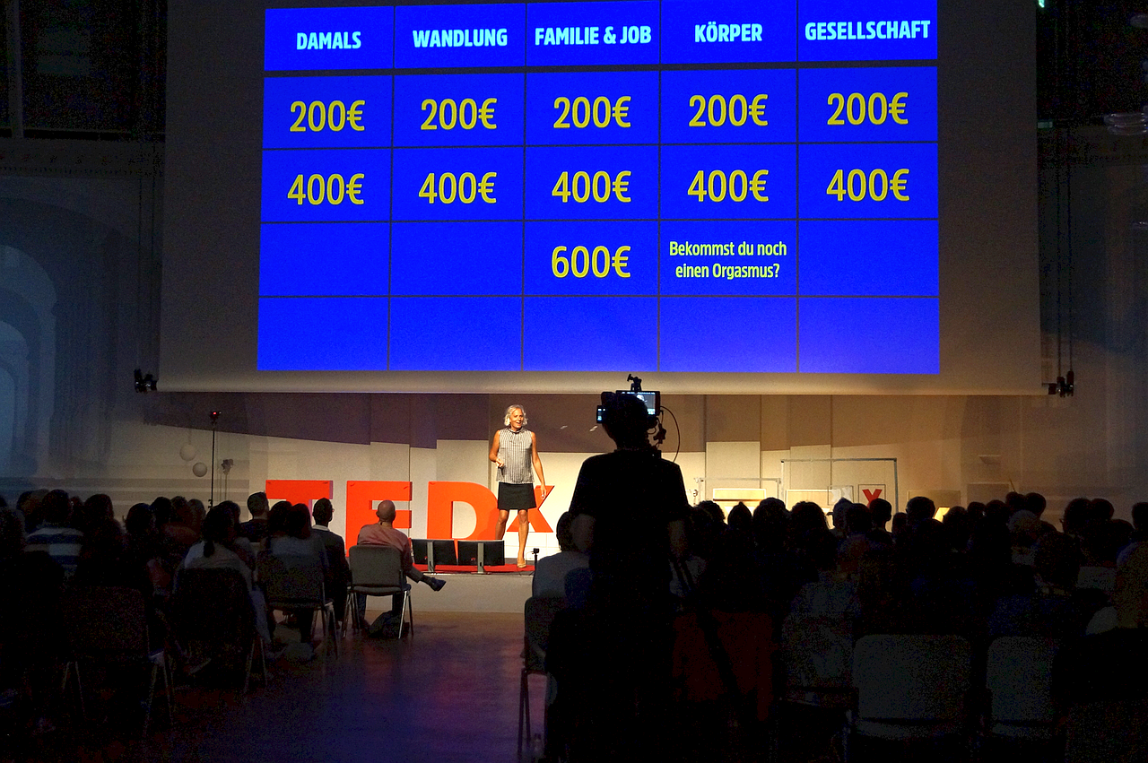 Vortrag Dana Diezemann beim TEDx Stuttgart am 14. September 2019